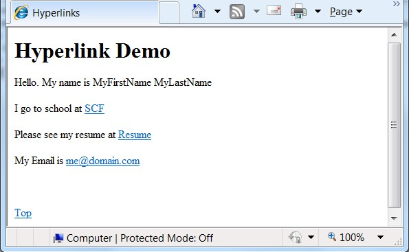 Монгол: зураг4